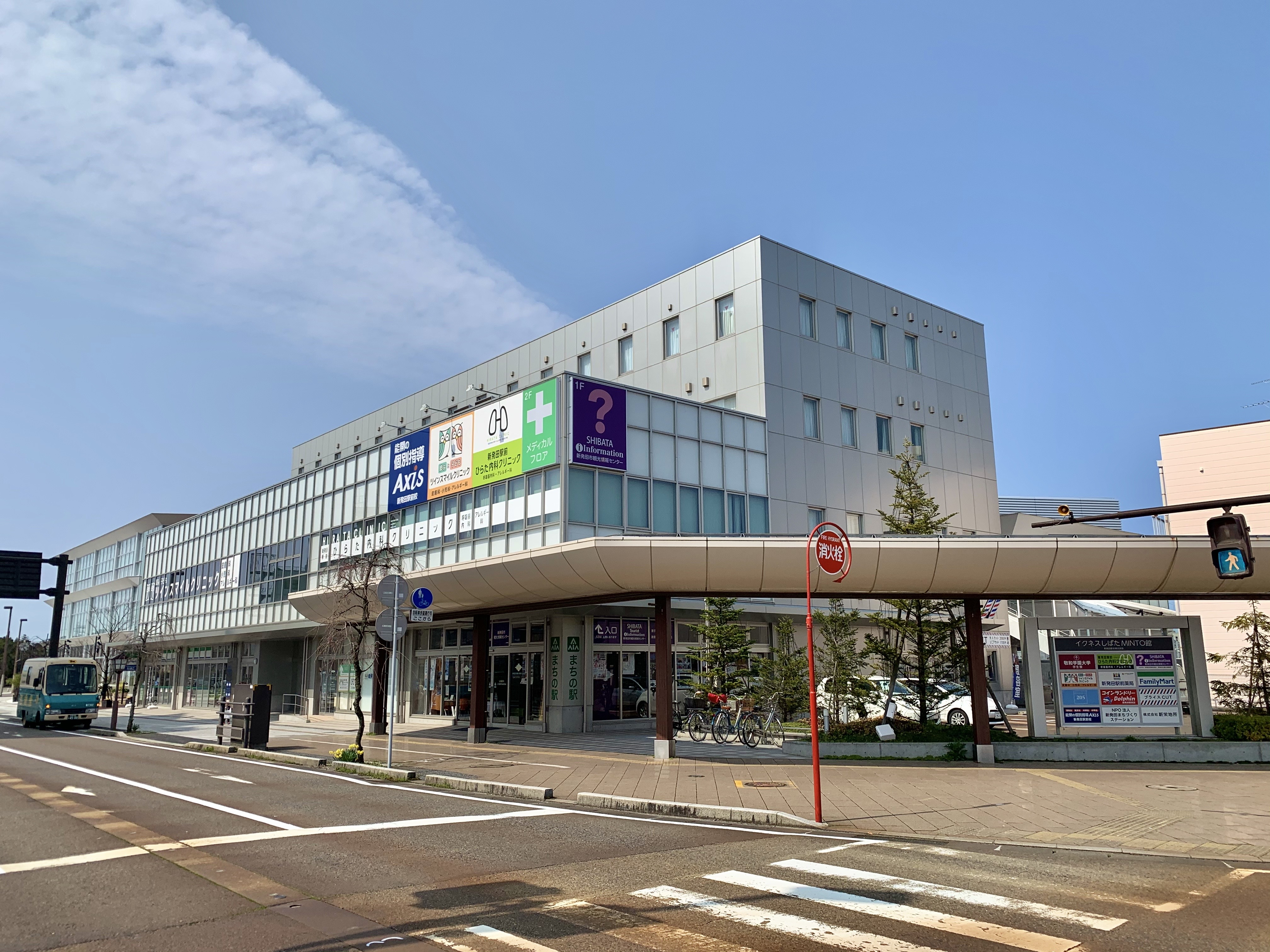 イクネスしばた民間棟「MINTO館」（2020年3月）